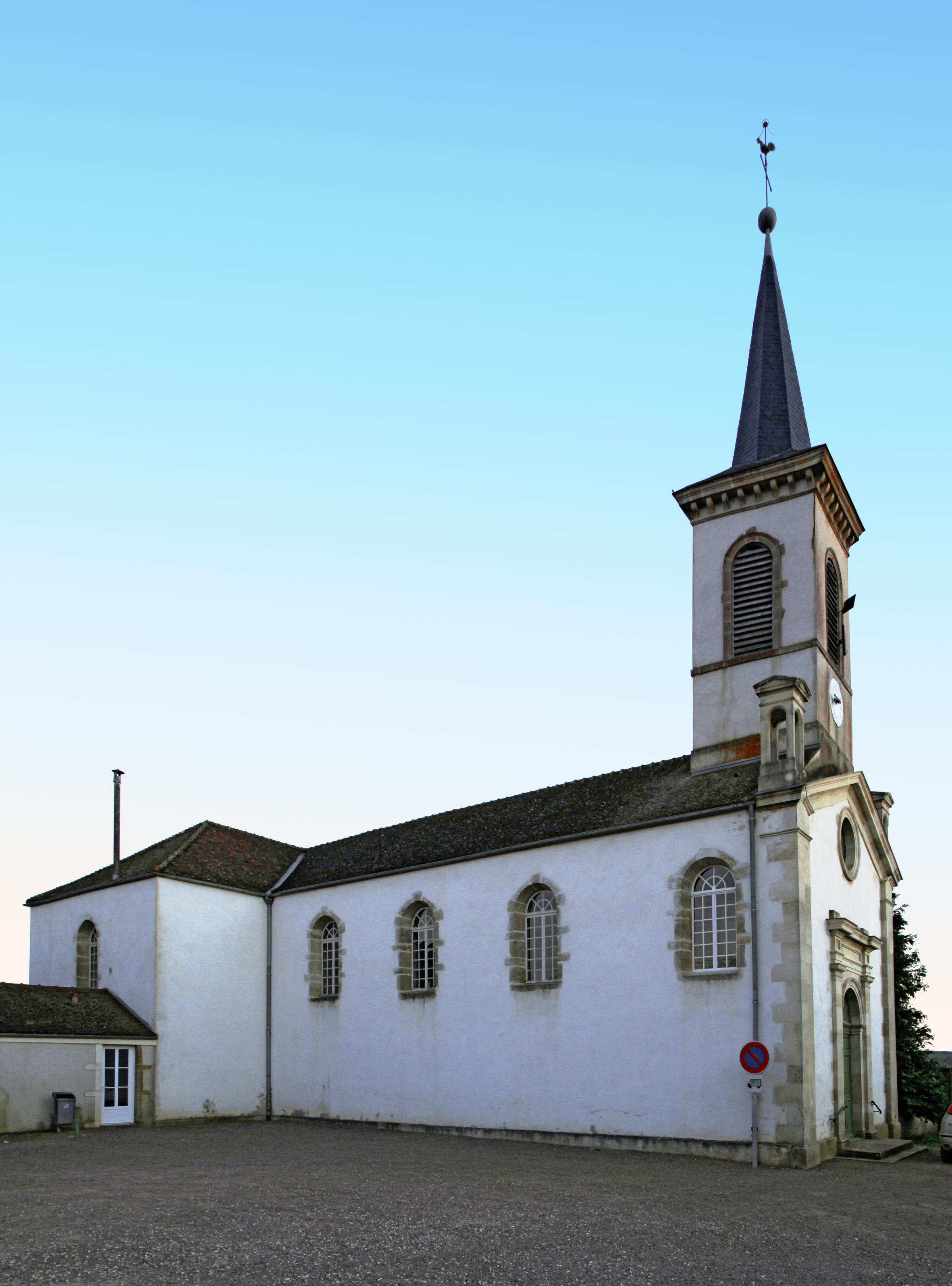 Église Saint-Jean-Baptiste de Courcelles-Frémoy